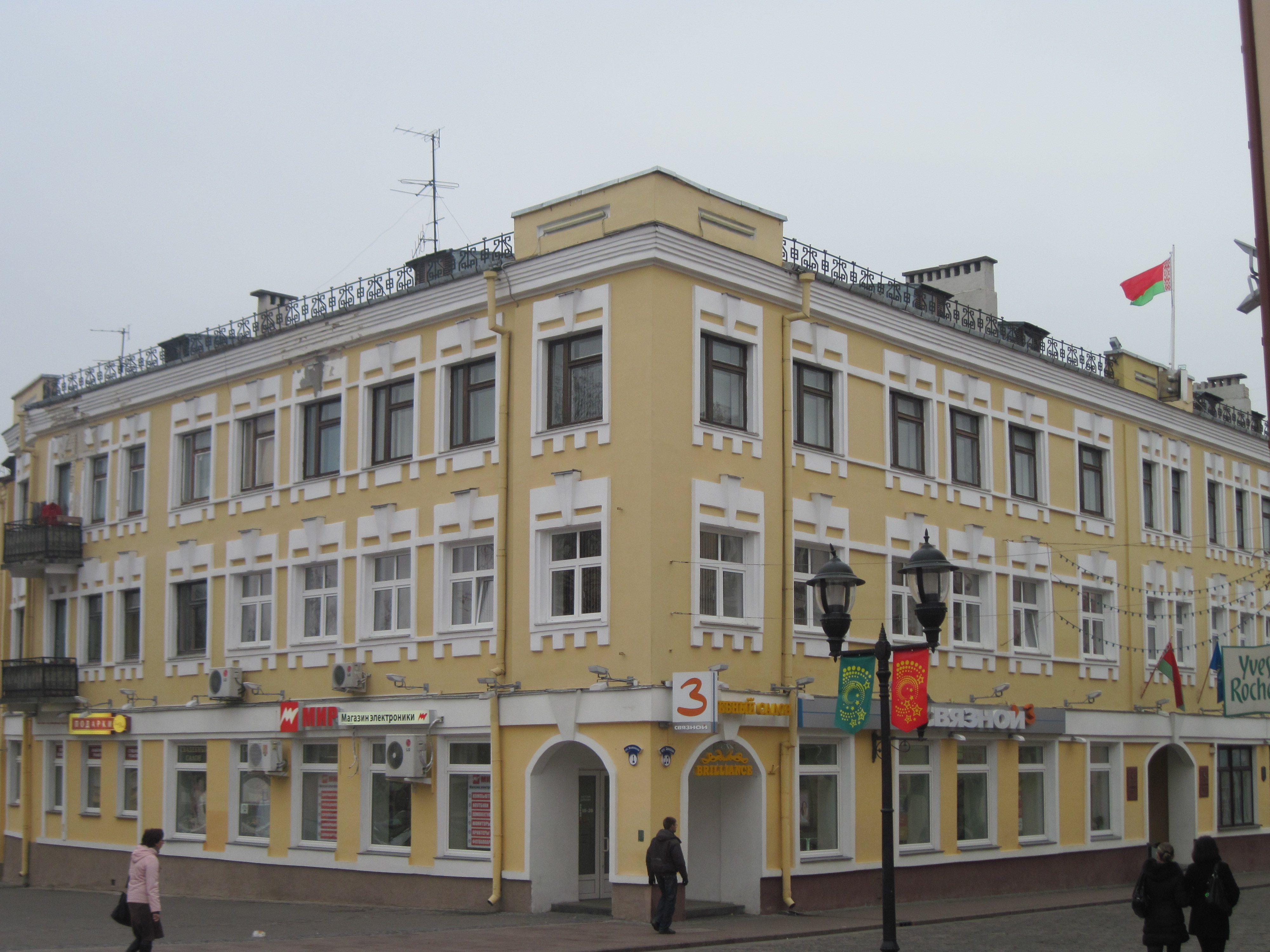 Беларуская (тарашкевіца): Выява Адміністрацыі Леніскага раена, Гродна, Савецкая, 10